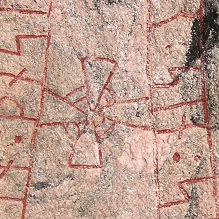 Sö107 Gredby kors